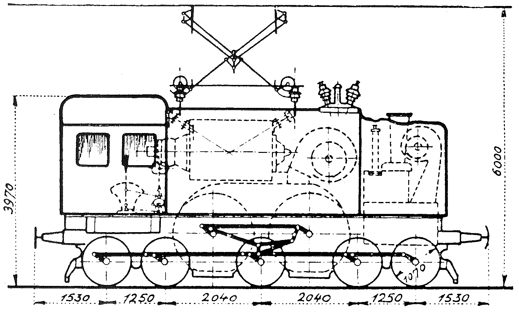 Prinzipskizze der MAV-Baureihe V 50